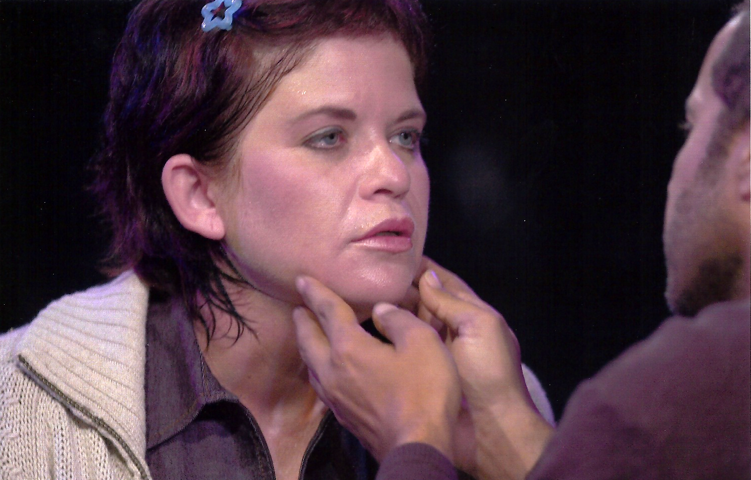 אורנה רוטברג ברוז - צמר צילום שיר פרייבך